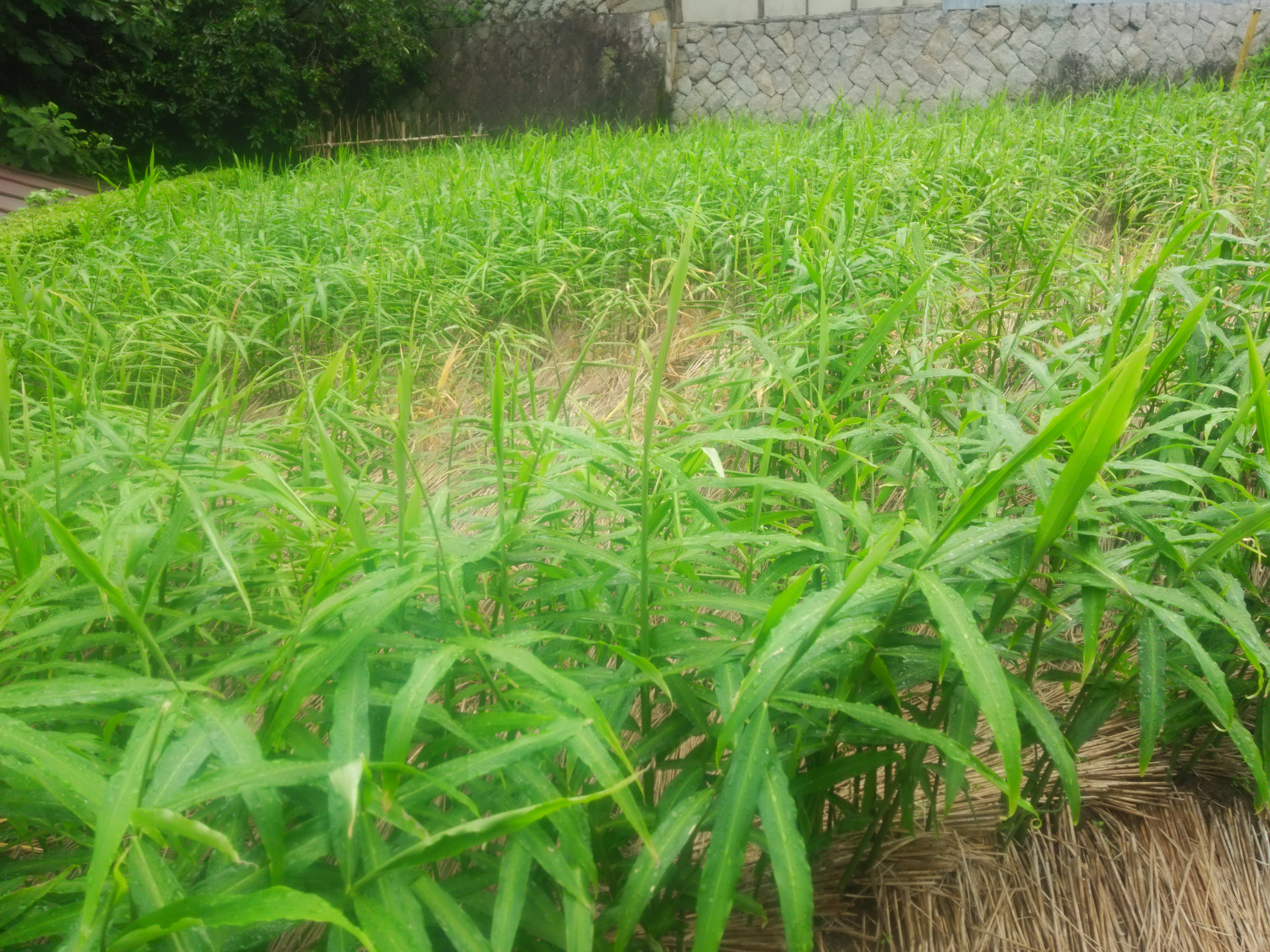 小しょうがの畑